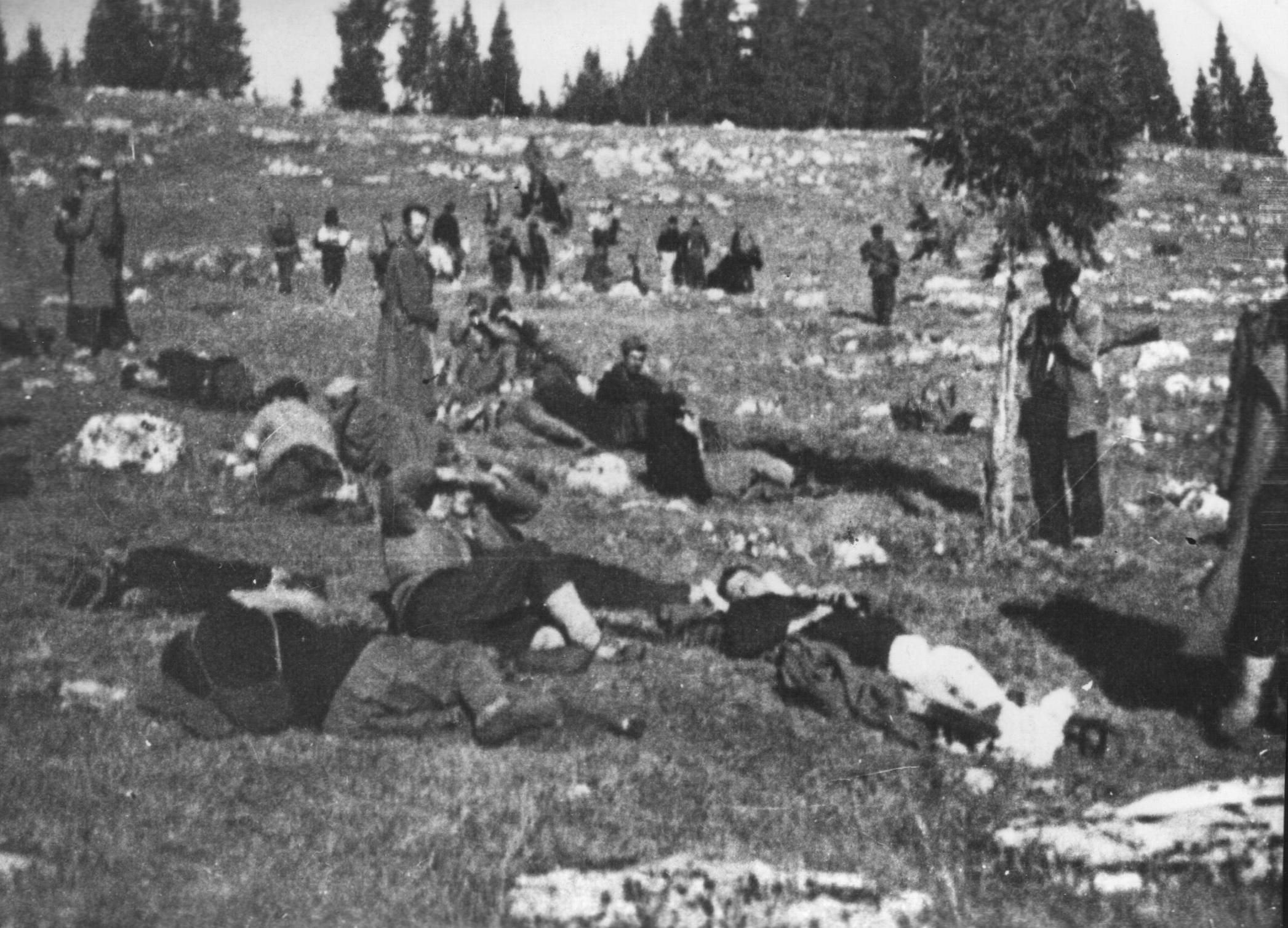 Srpskohrvatski / српскохрватски: Posle borbe koja je trajala čitavu noć, oko Jajca, Drugi bataljon IV crnogorske brigade prebacuje ranjenike, jesen 1942.